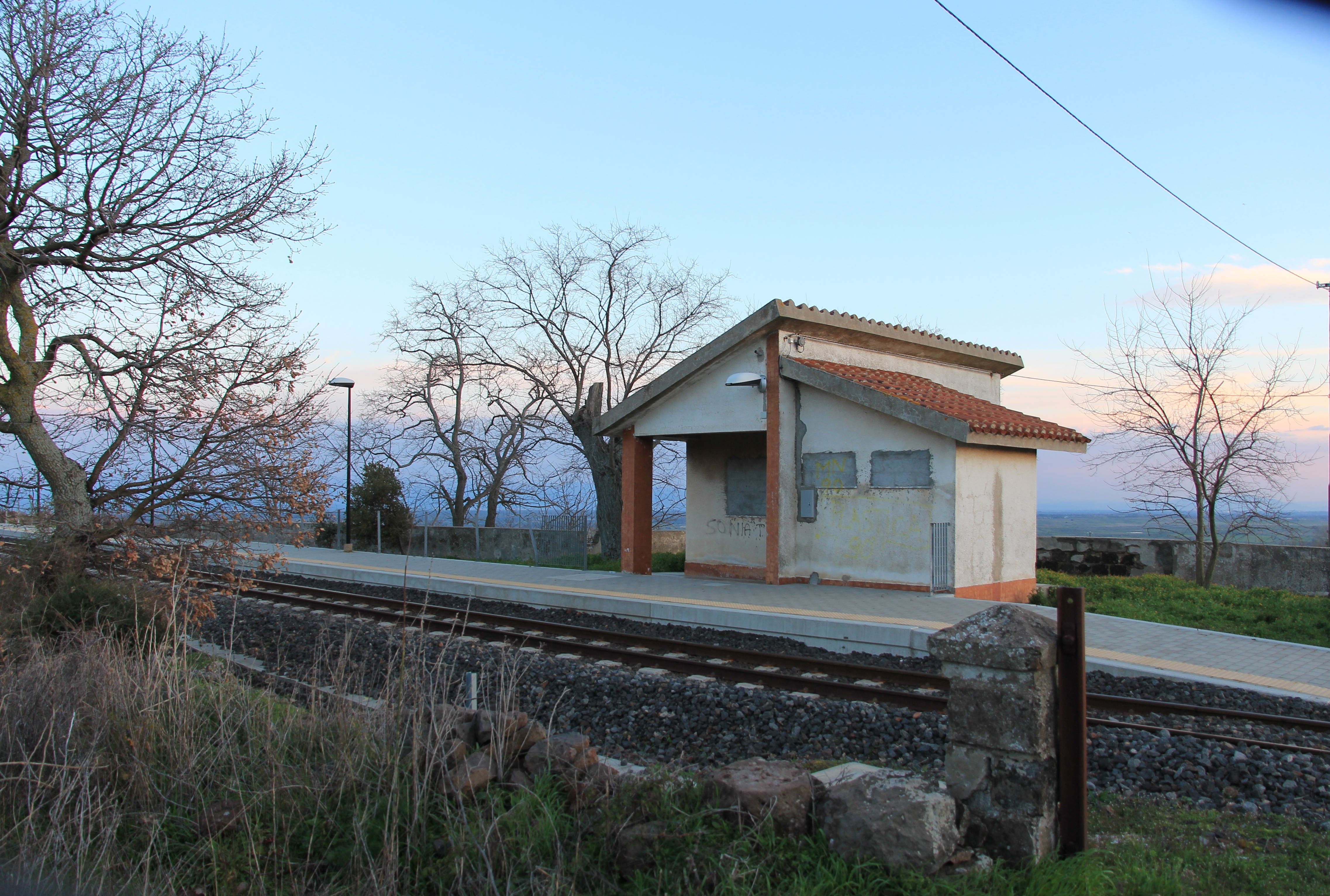 Stazione ferroviaria ARST di Birori